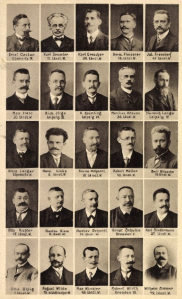 Ansichtskarte Die sozialdemokratische Fraktion des sächsischen Landtags (einzige Aufschrift auf der Rückseite) Ernst Castan, Karl Demmler, Karl Heinrich Drescher, Hermann Fleißner, Julius Fräßdorf, Max Heldt, Richard Illge, Alfred Keimling, Max Manilius Krauße, Heinrich Lange, Albin Langer, Hermann Linke, Bruno Mehnert, Robert Müller, August Emil Nitzsche, Otto Richter, Gustav Riem, Gustav Schmidt, Ernst Schulze, Karl Sindermann, Karl Otto Uhlig, August Wilde, Max Winkler, Robert Wirth, Otto Zimmer